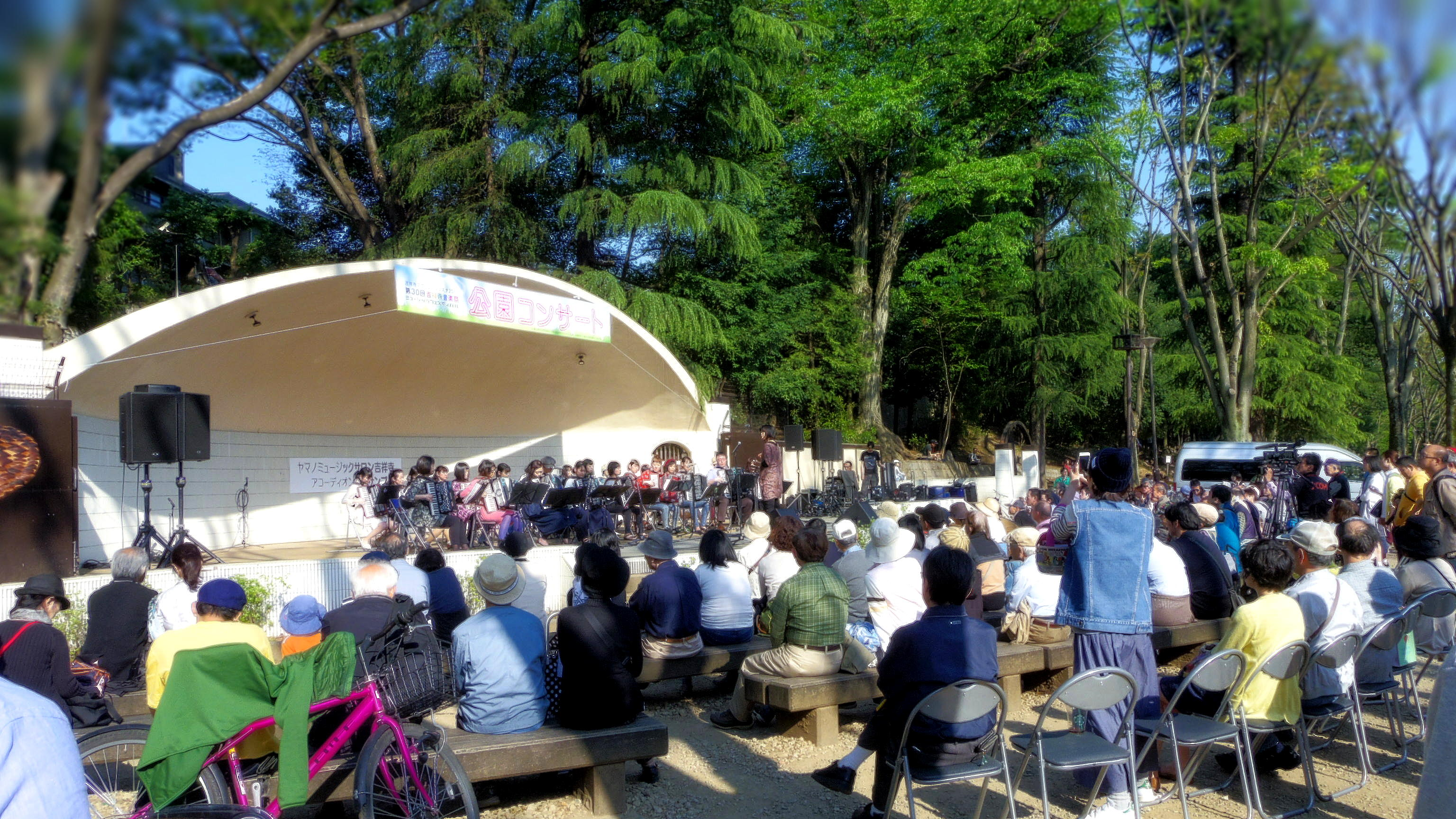 毎年ゴールデンウィークに開かれる「吉祥寺音楽祭」。2015年4月26日に井の頭公園野外ステージで開かれた「公園コンサート」の模様。